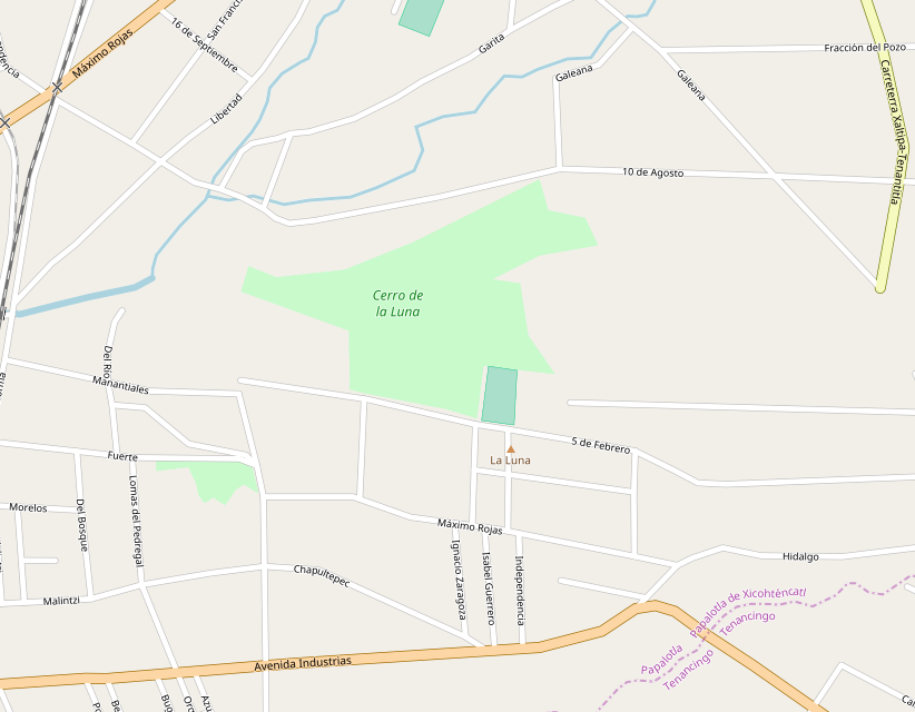 Delimitación del Cerro de la Luna en la Ciudad de Papalotla en Tlaxcala, México.